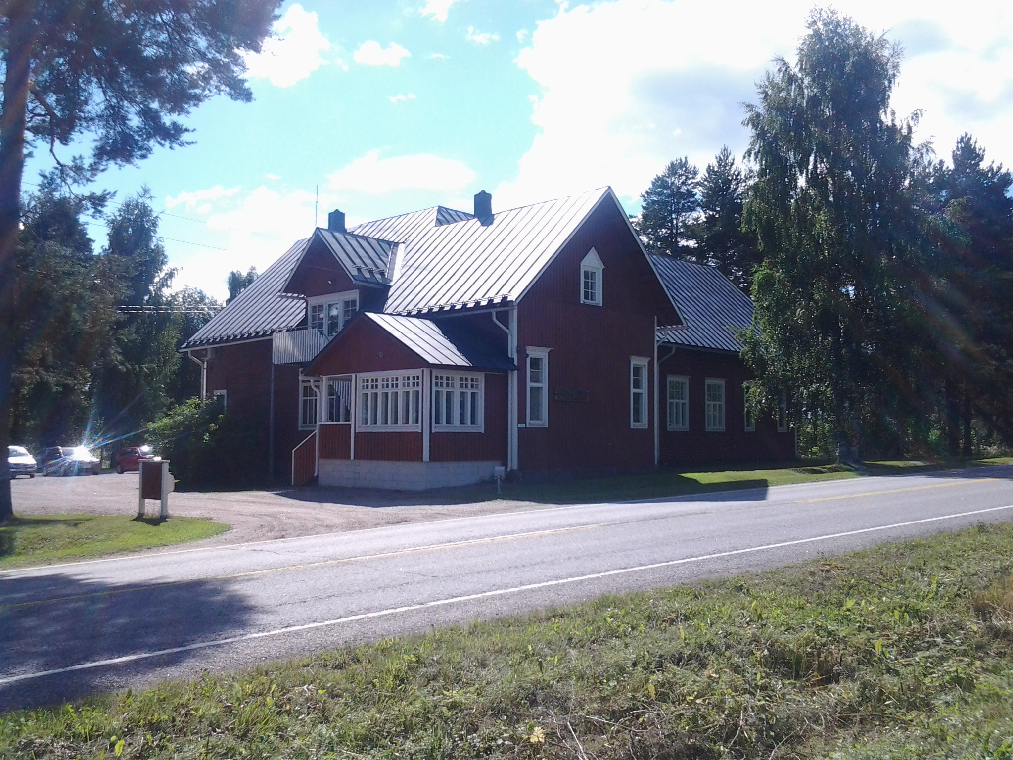 Nuorisotalo Kukonkoivussa, Hollolassa.